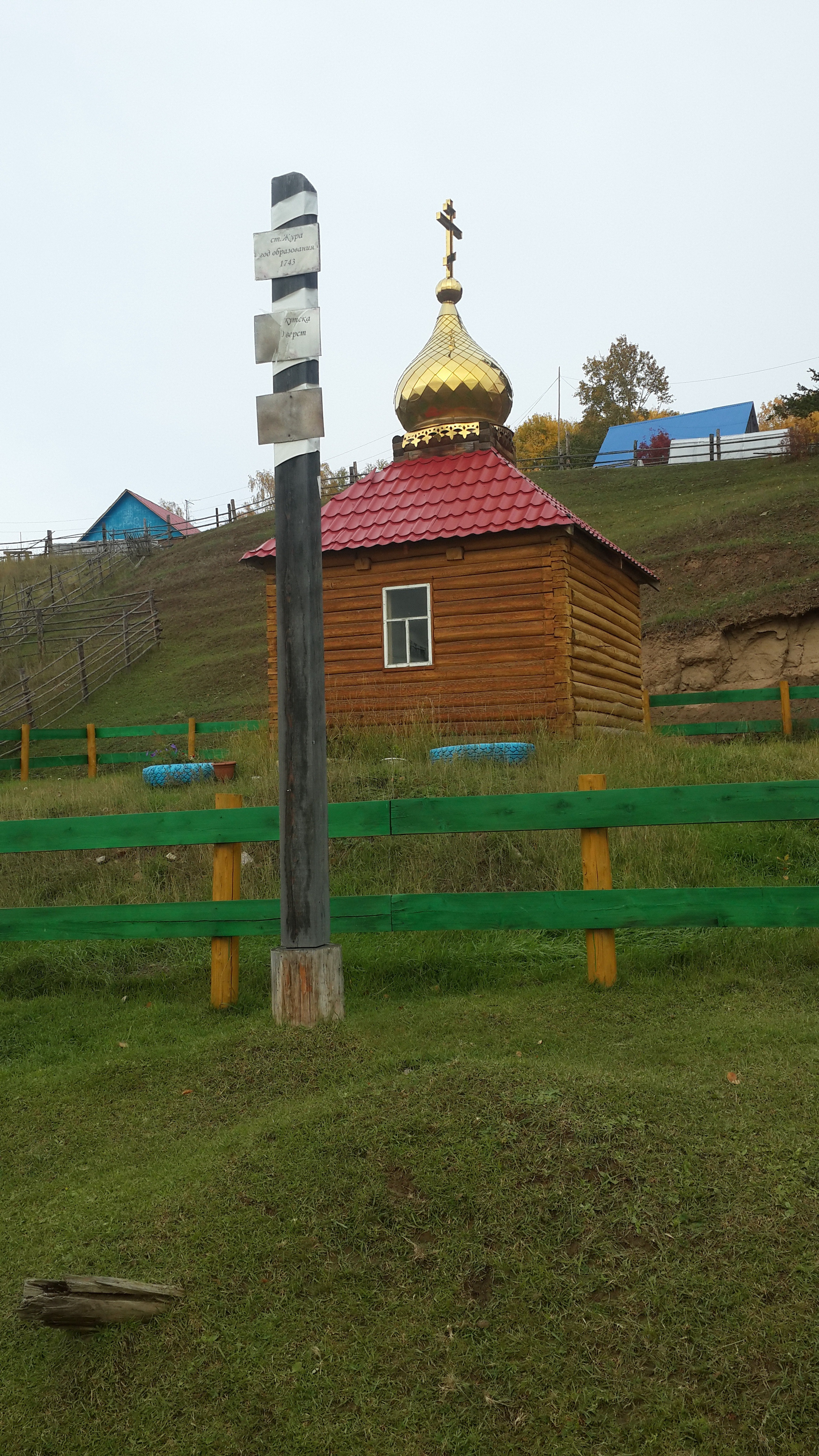 Ул. И. Никифорова